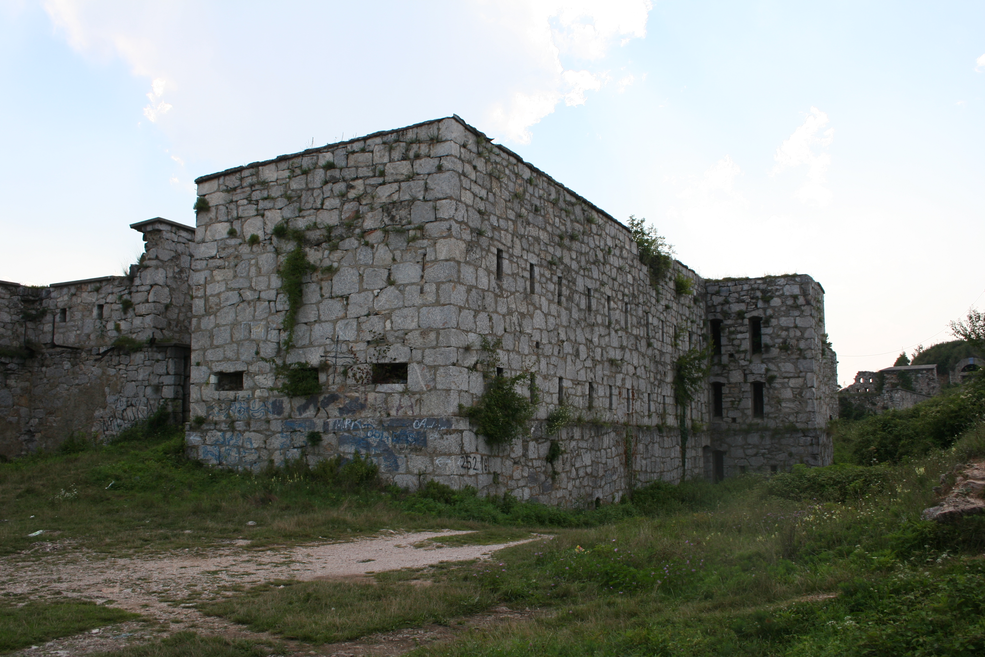 Stari grad Zvornik NKD390